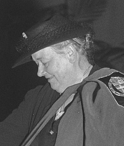 Collectie / Archief : Fotocollectie Anefo Reportage / Serie : [ onbekend ] Beschrijving : RK Universiteit erepromotie Maria Koenen Datum : 5 mei 1949 Trefwoorden : Erepromoties Persoonsnaam : Maria Koenen Fotograaf : Merk, Ben / Anefo Auteursrechthebbende : Nationaal Archief Materiaalsoort : Glasnegatief Nummer archiefinventaris : bekijk toegang 2.24.01.09 Bestanddeelnummer : 903-3655